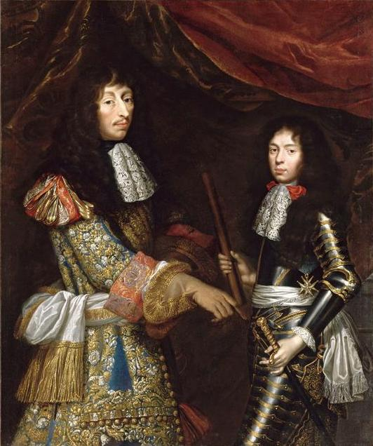 Louis de Bourbon, prince de Condé et son fils aîné Henri Jules de Bourbon, duc d'Enghien